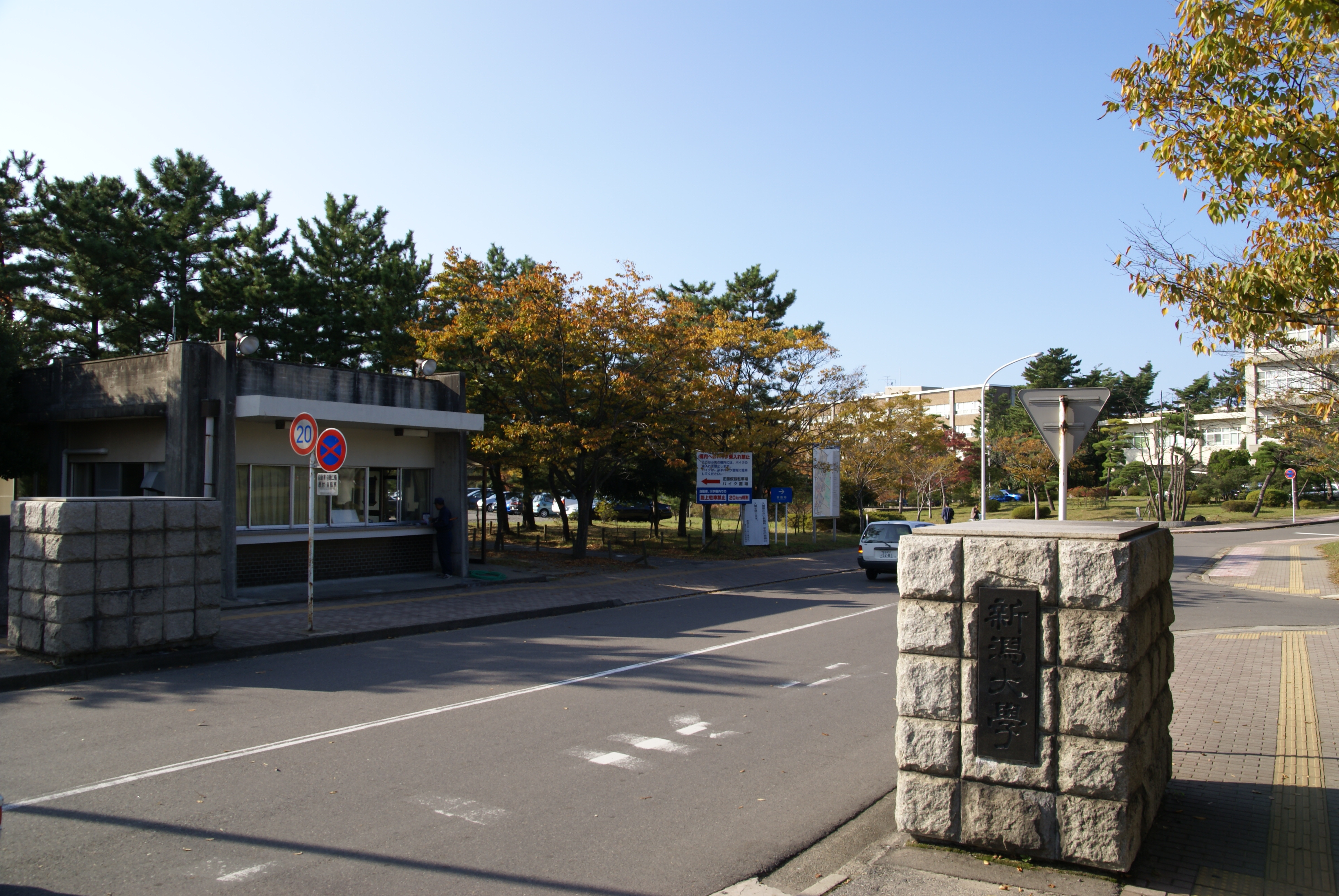 新潟大学正門